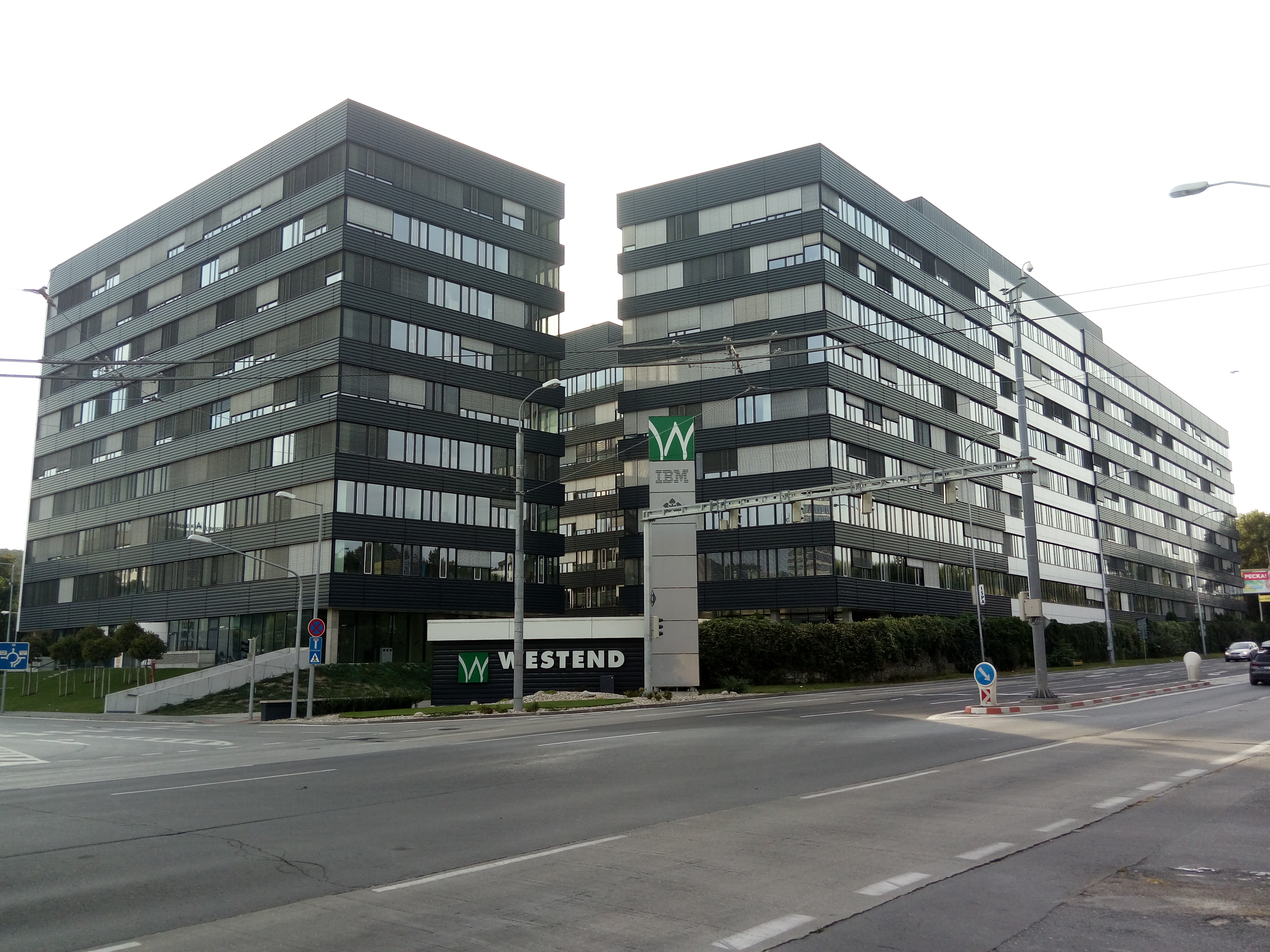 Patrónka, Bratislava